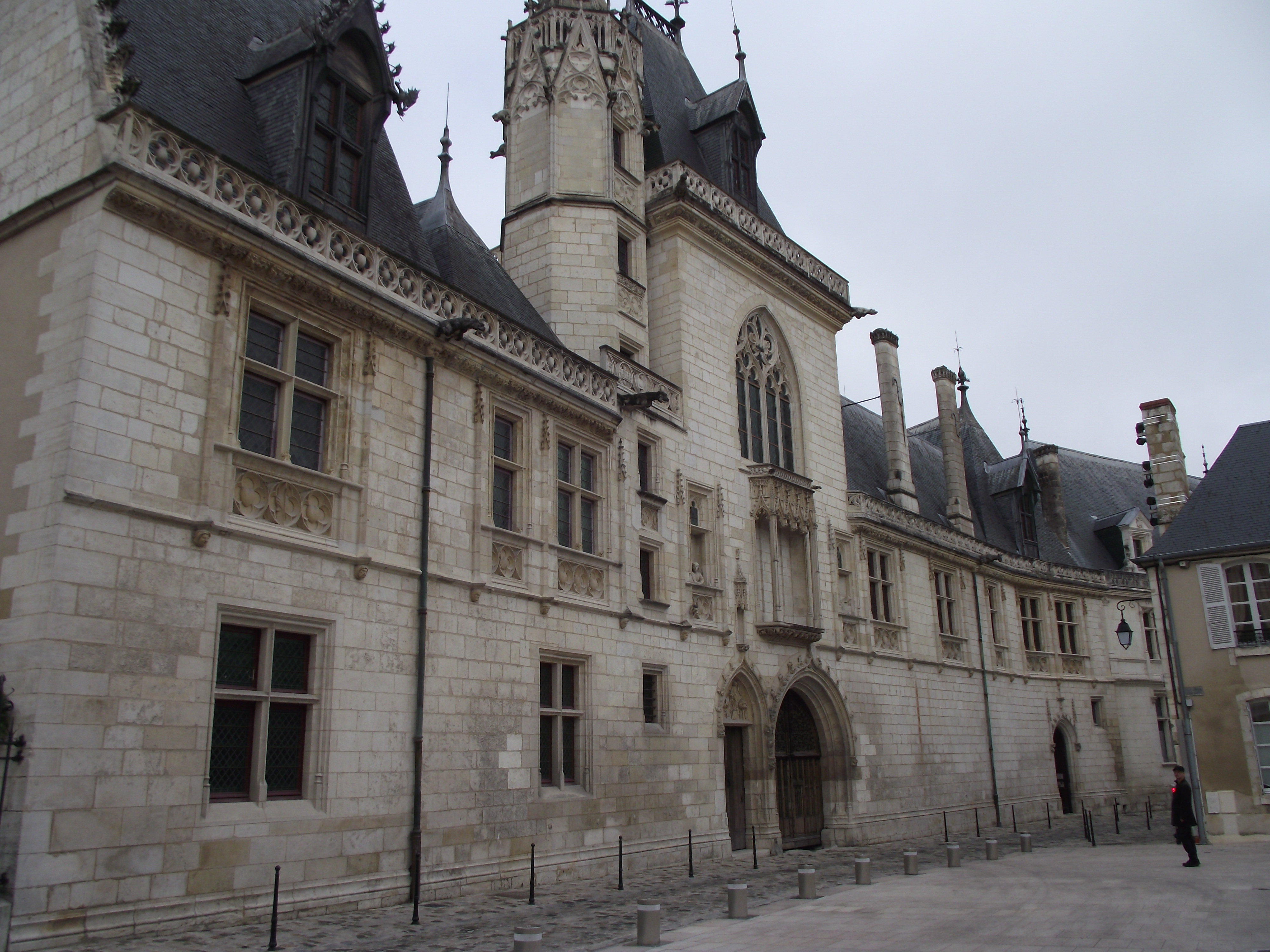 Bourges, Palais Jacques-Cœur, 1443-51